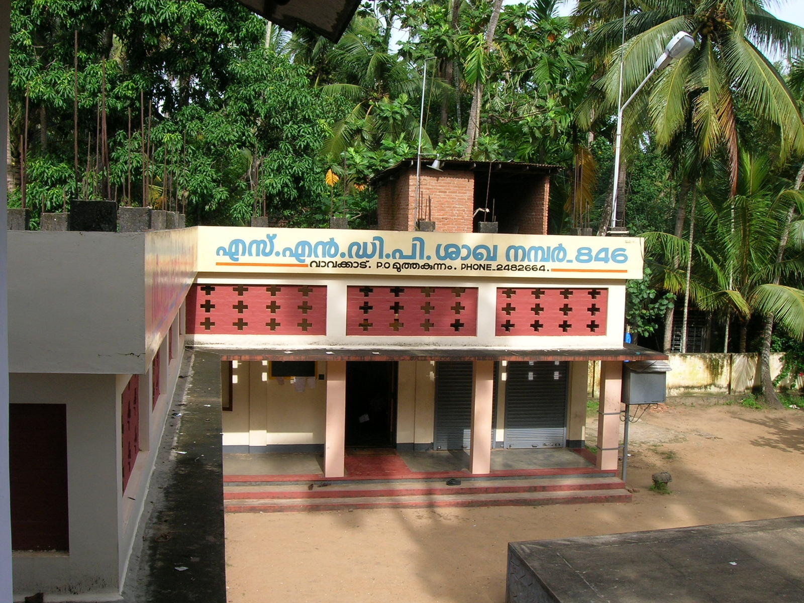 എസ് എൻ ഡി പി ശാഖായോഗം നമ്പർ : 846